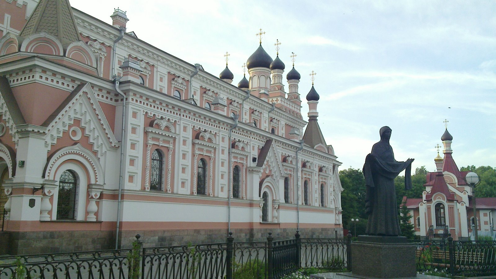 Leninsky, Grodno, Belarus